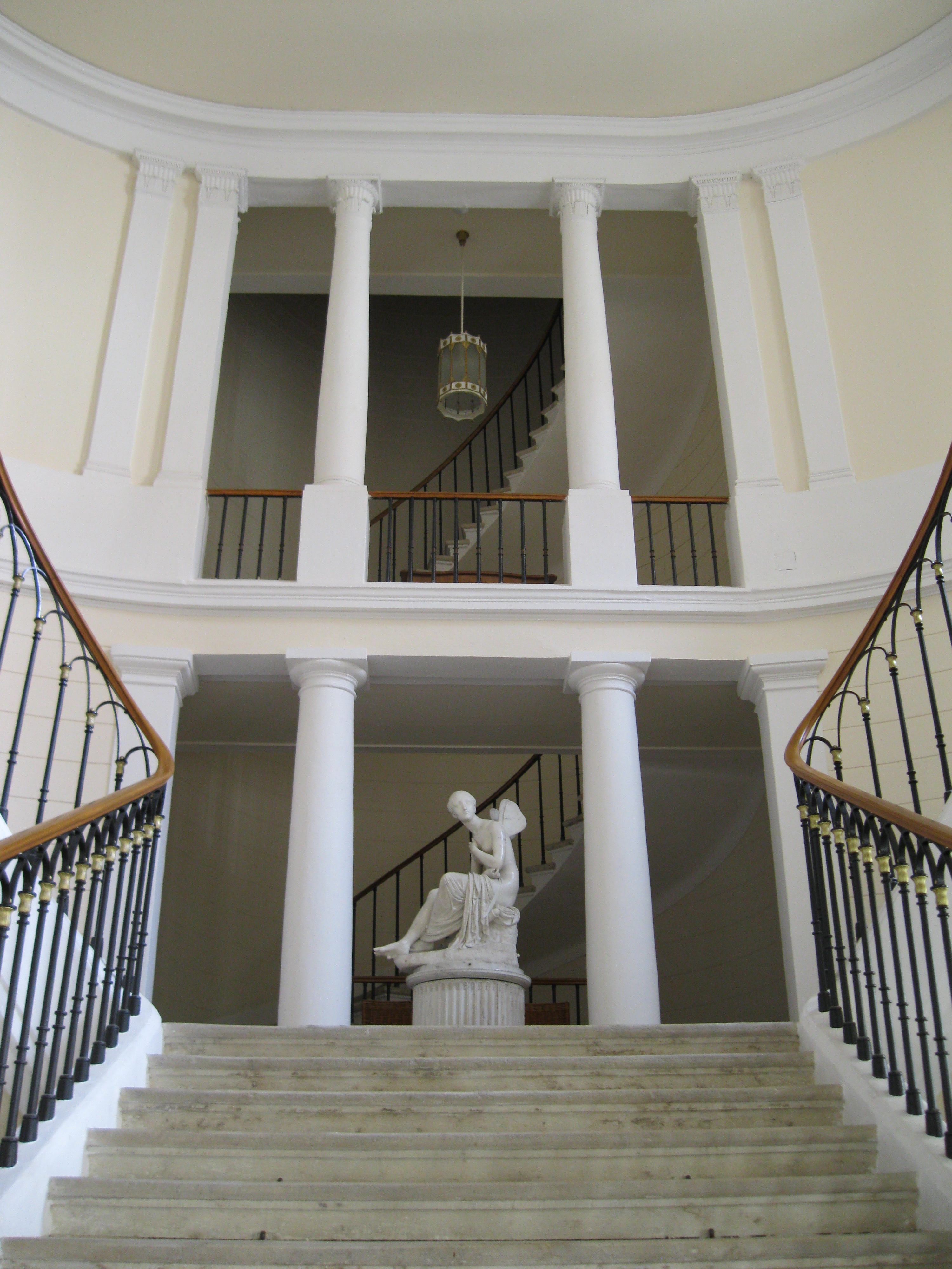 Zámek Boskovice, Hradní 638/6, Boskovice